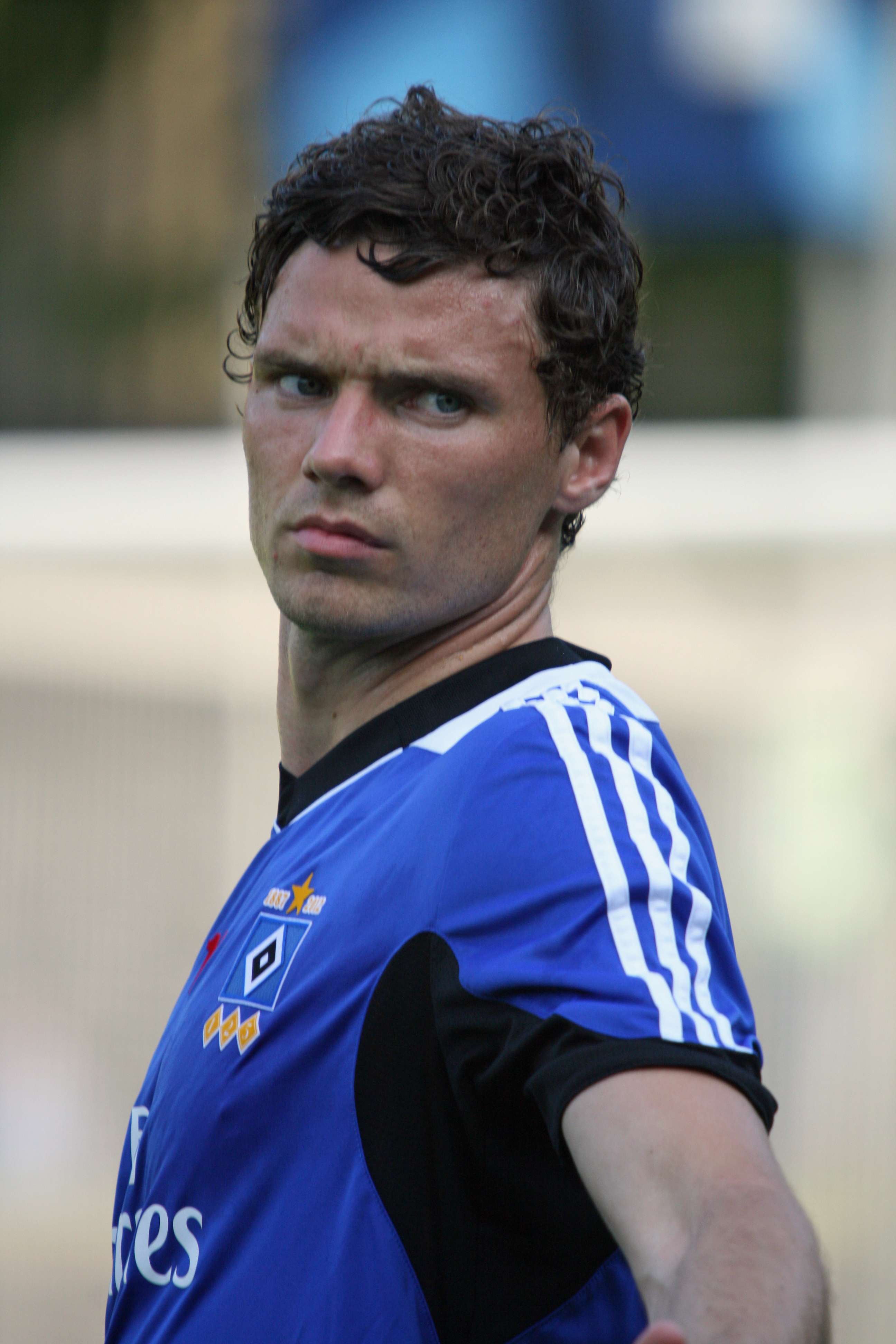 Marcus Berg , der schwedische Mittelstürmer des Hamburger SV im Testspiel gegen Eintracht Norderstedt / Juli 2012